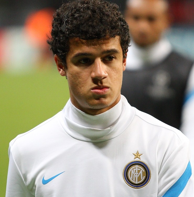 Coutinho prima di CSKA Mosca-Inter del 27-11-2011